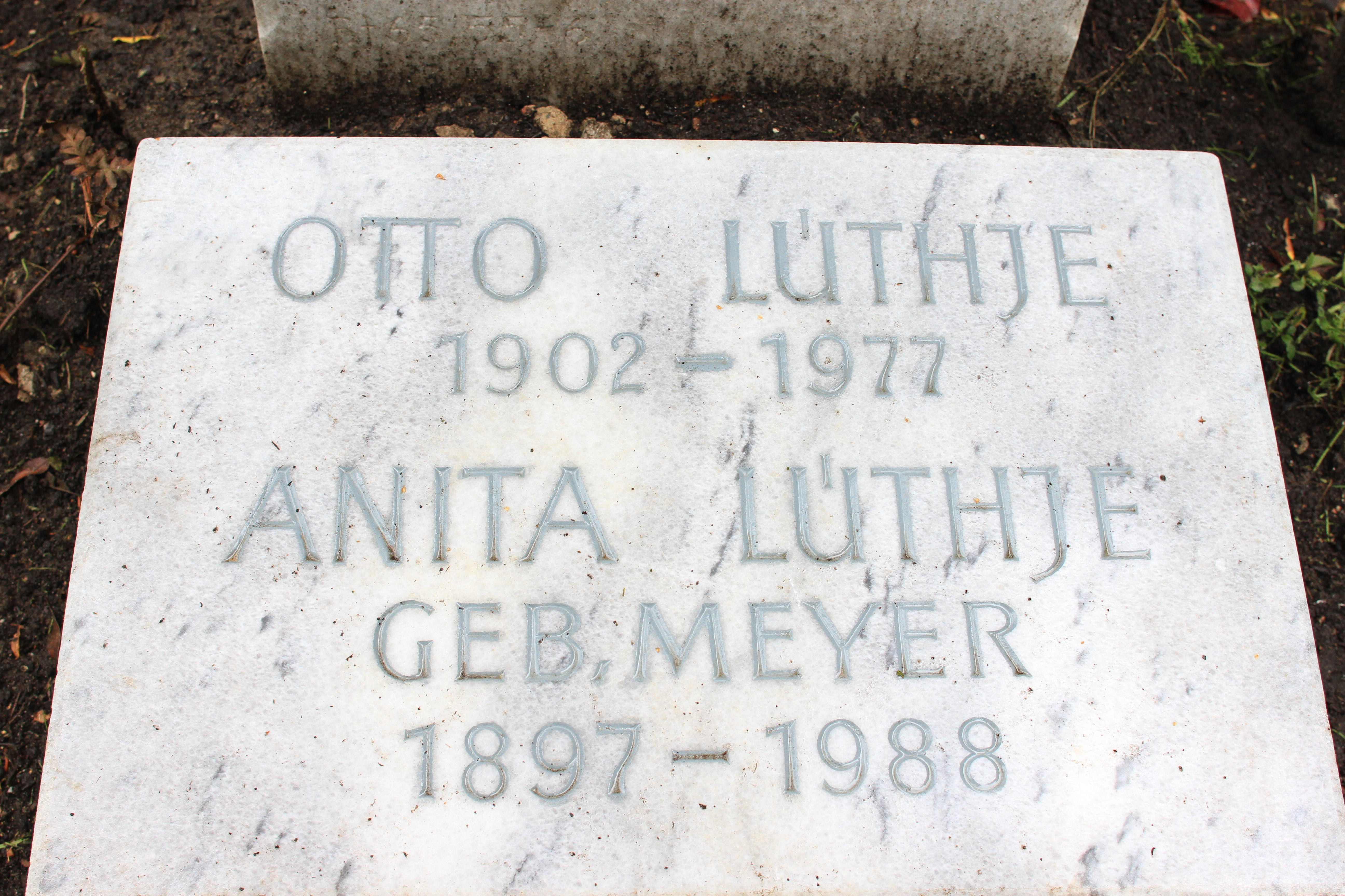 Otto Lüthje (* 17. Mai 1902 in Hamburg; † 23. Januar 1977 ebenda; in Besetzungslisten manchmal auch Otto Lütje) war ein deutscher Schauspieler, Hörspielsprecher und Mittelschullehrer.